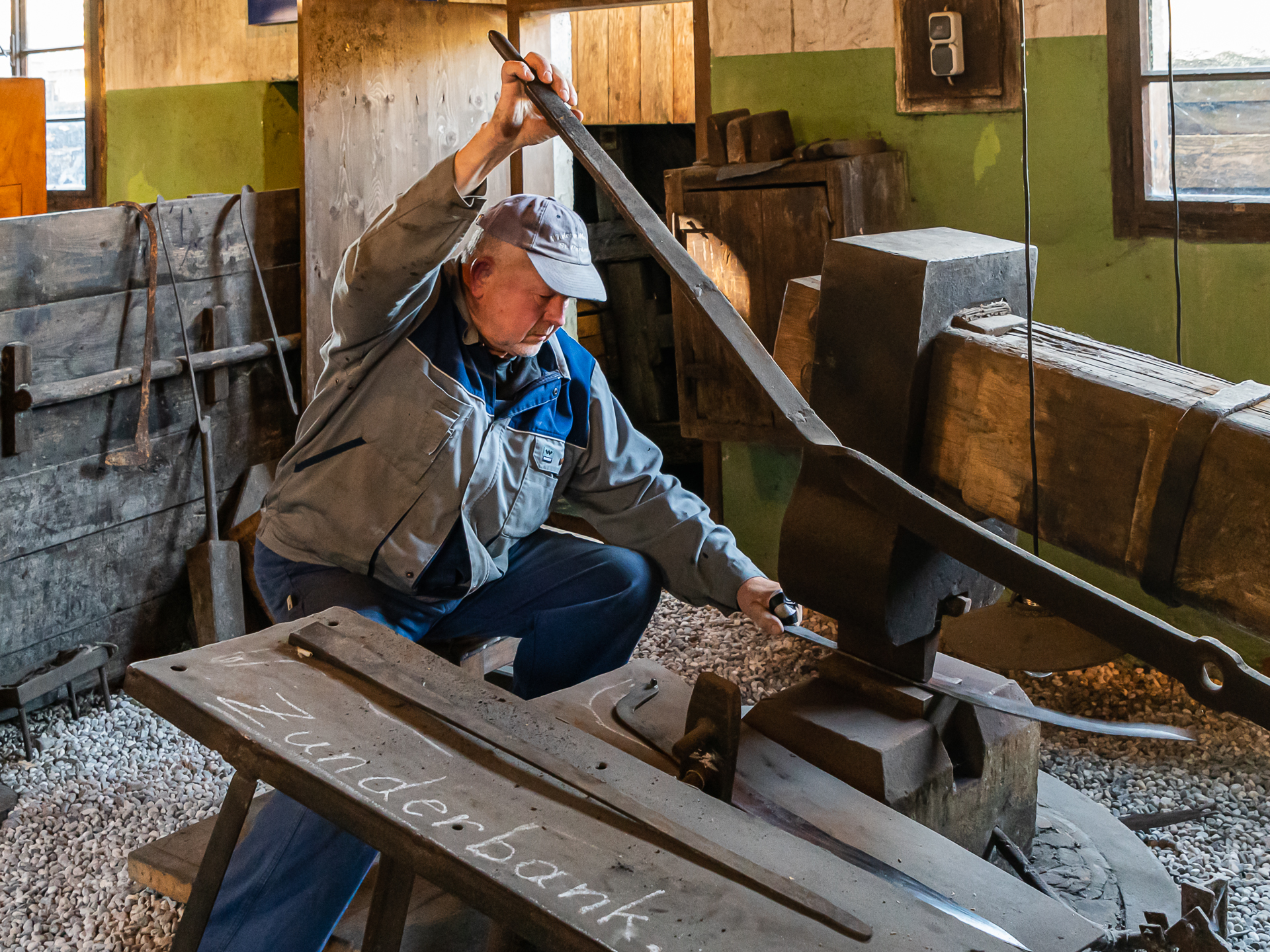 Der Sensenschmied Hubert Wagner beim Breiten eines Sensenblattes am Schwanzhammer im Museum Geyerhammer in Scharnstein. Dieses Bild wurde anlässlich des österreichischen Tags des Denkmals 2019 in Oberösterreich eingereicht. Diese Datei wurde im Rahmen von WikiDaheim 2019 in Österreich erstellt und hochgeladen.Sie wurde dem Themenbereich Denkmalschutz zugeordnet.